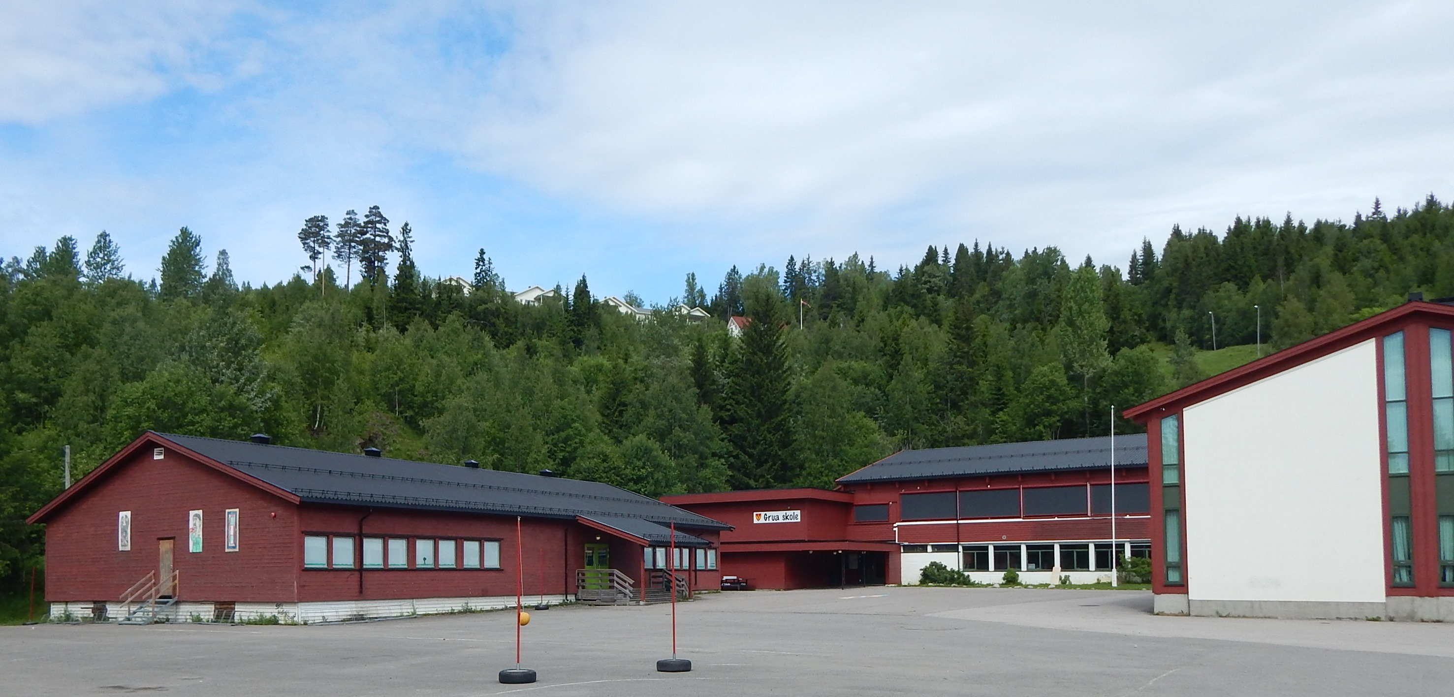 Grua skole i Grua, Lunner kommune